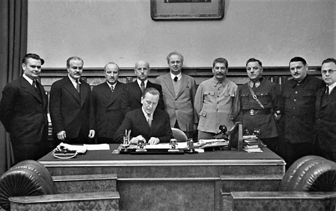 Подписание советско-литовского договора о передаче Литве города Вильно. Договор подписывает Министр иностранных дел Литовской республики Юозас Урбшис. В зале присутствуют члены правительств Литвы и СССР, в том числе Вячеслав Молотов, Владимир Потёмкин, Иосиф Сталин, Клим Ворошилов, Андрей Жданов